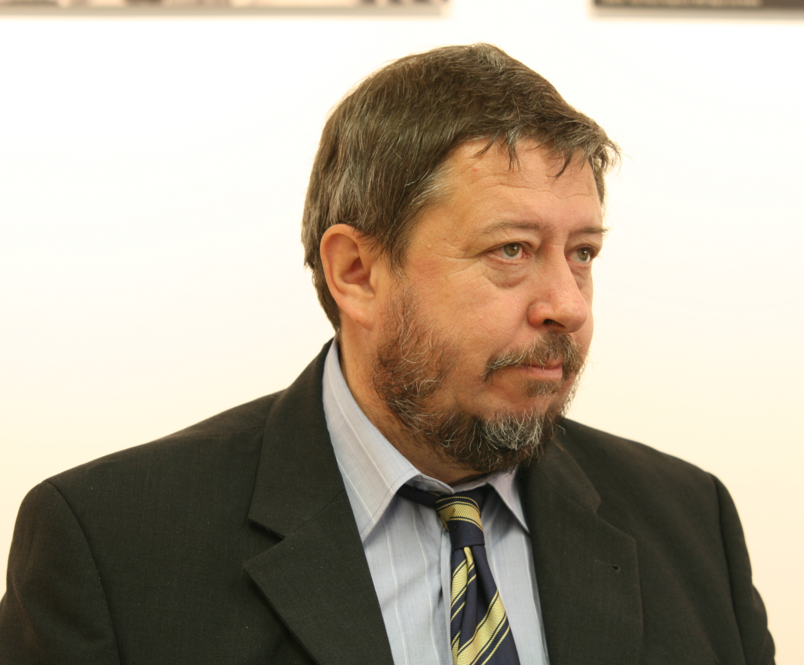 Dinko Šokčević 2016. godine